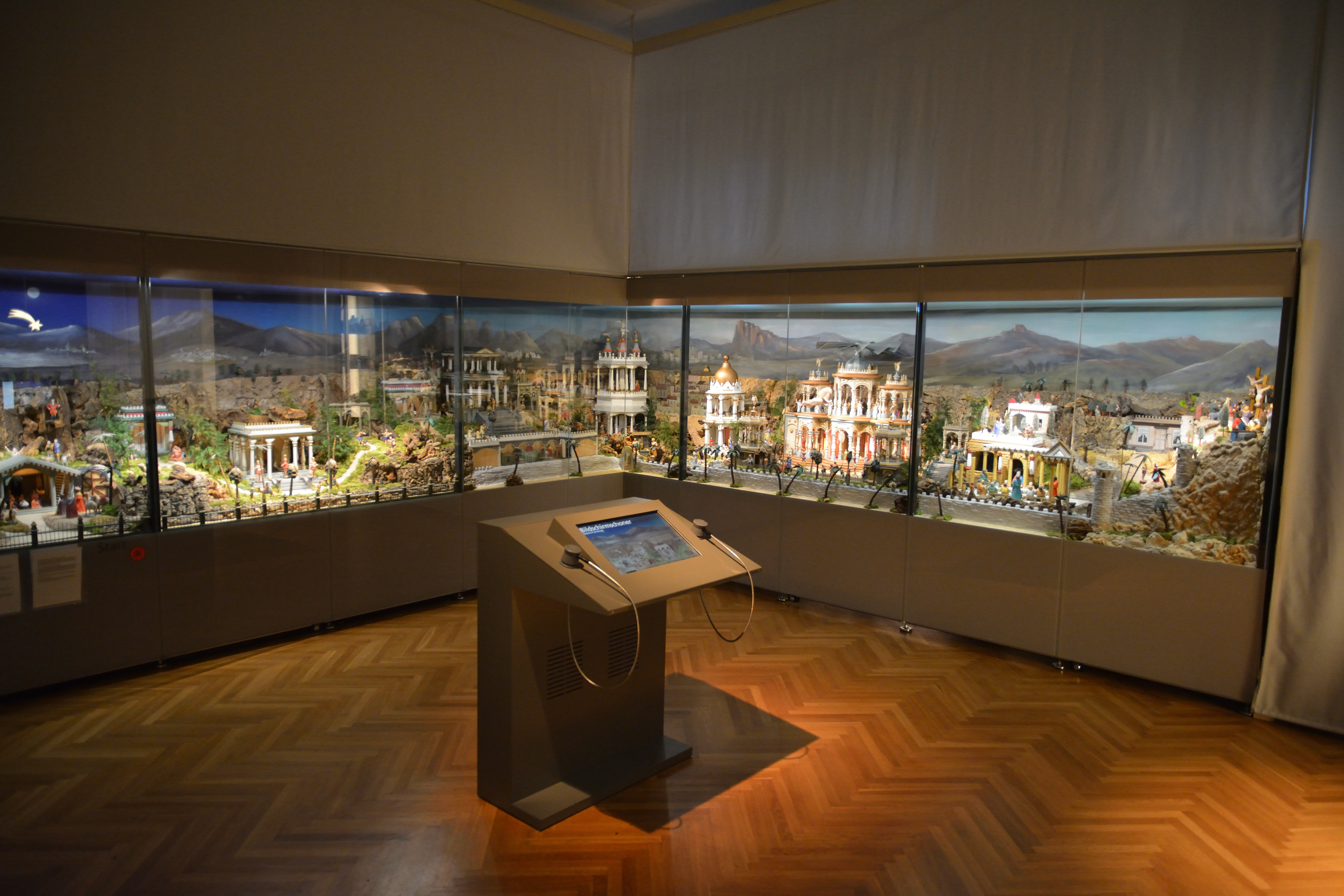 Impressionen aus dem Museum Europäischer Kulturen in Berlin. Ausstellungsraum: Der mechanische Weihnachtsberg aus dem Erzgebirge [1][2]